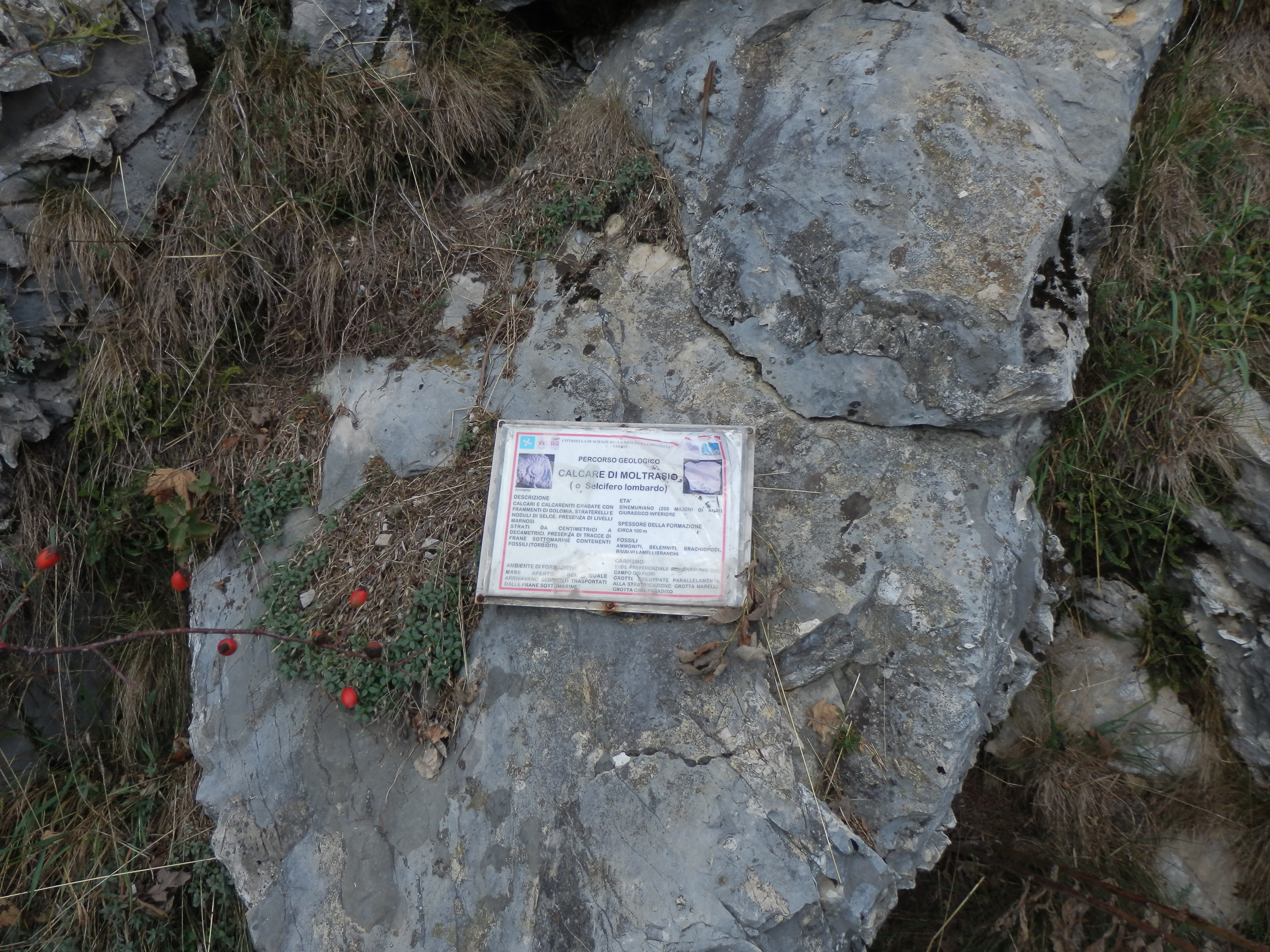 Calcare di Moltrasio o Selcifero Lombardo. Campo dei Fiori (VA). Lombardia.